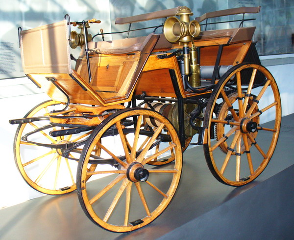 Stuttgart-Bad Cannstatt Werkstatt Gottlieb Daimler: Modell Kutsche 1886